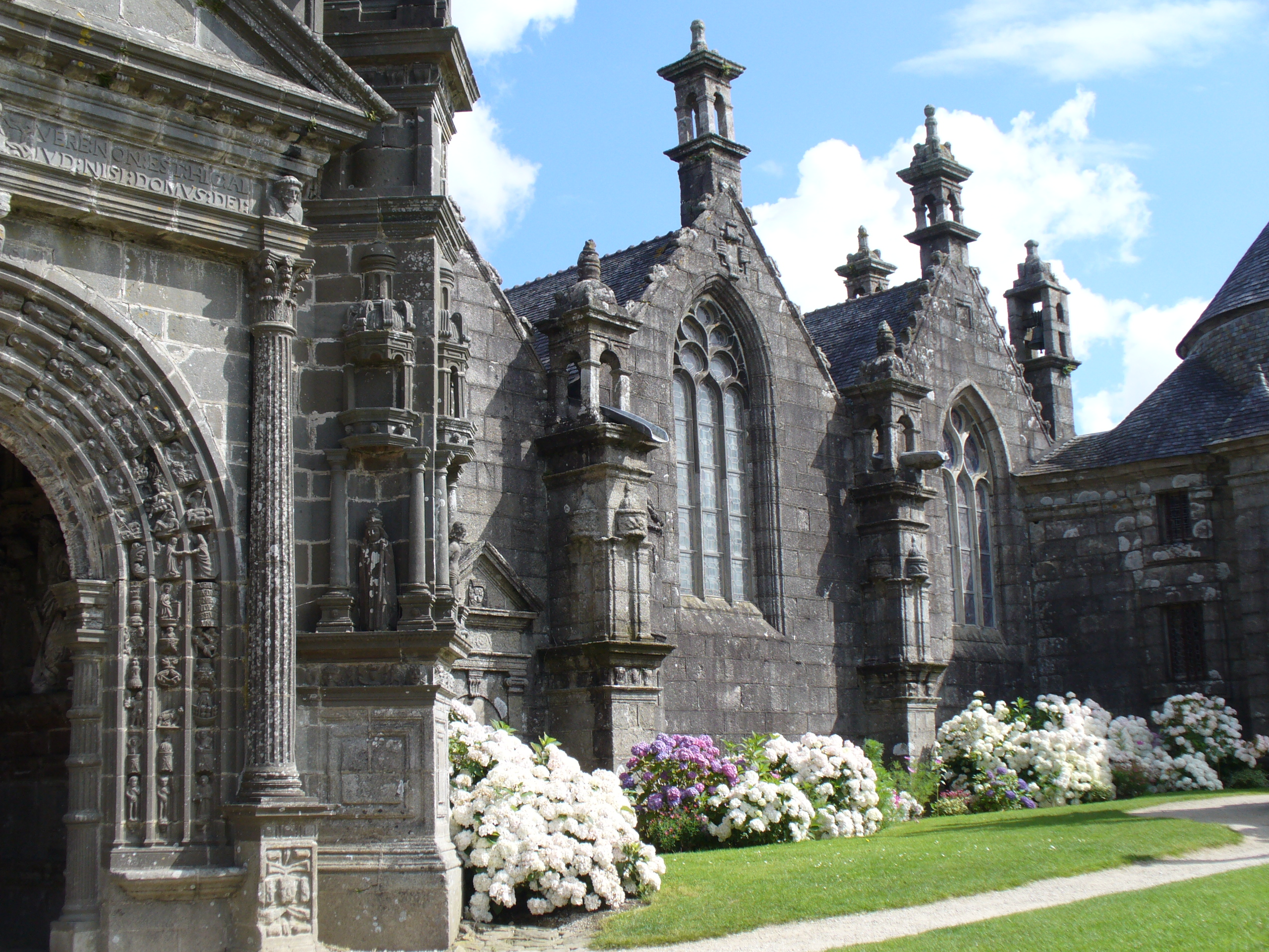 Die zweischiffige Kirche Eglise Saint Miliau(16.Jh.)von Guimiliau Baustil - Übergang vom Flamboyant zur Renaissance aus Granit errichtet.Enclos Paroissal-Umfriedeter Pfarrbezirk